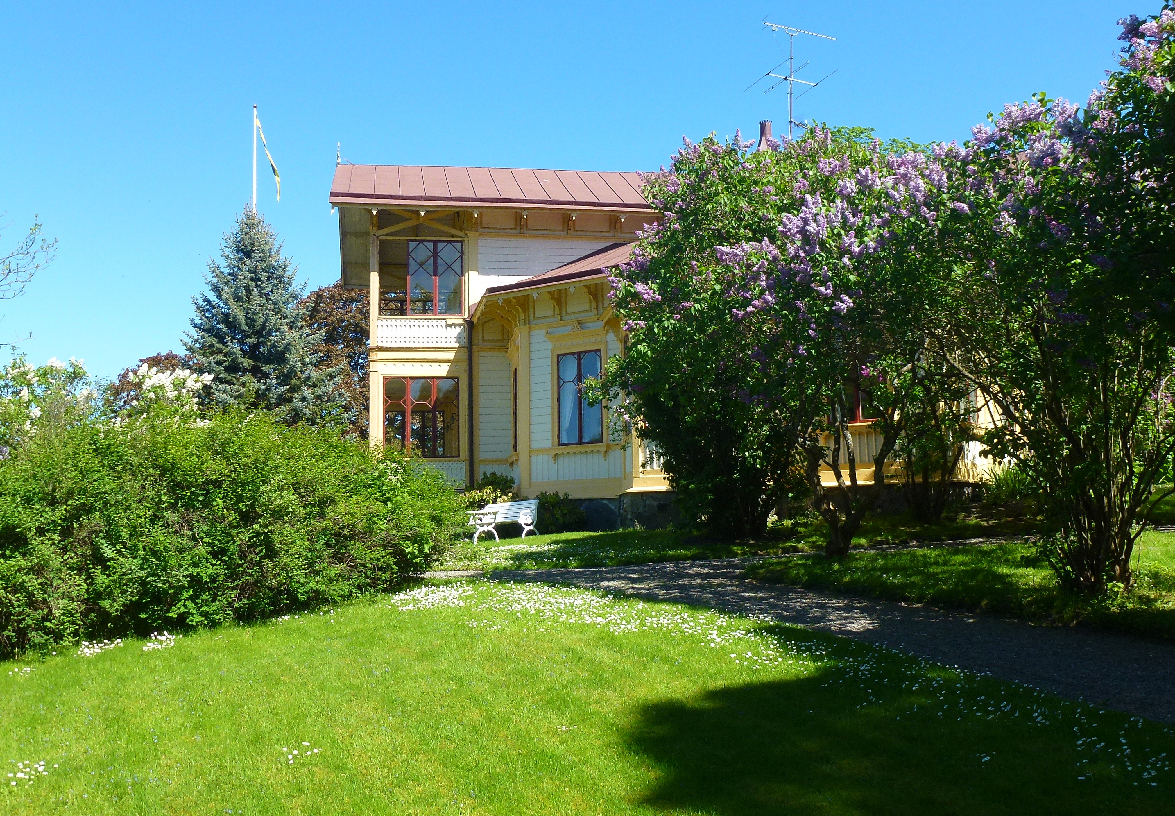 Villa Loviseberg på Ulriksdals slotts område